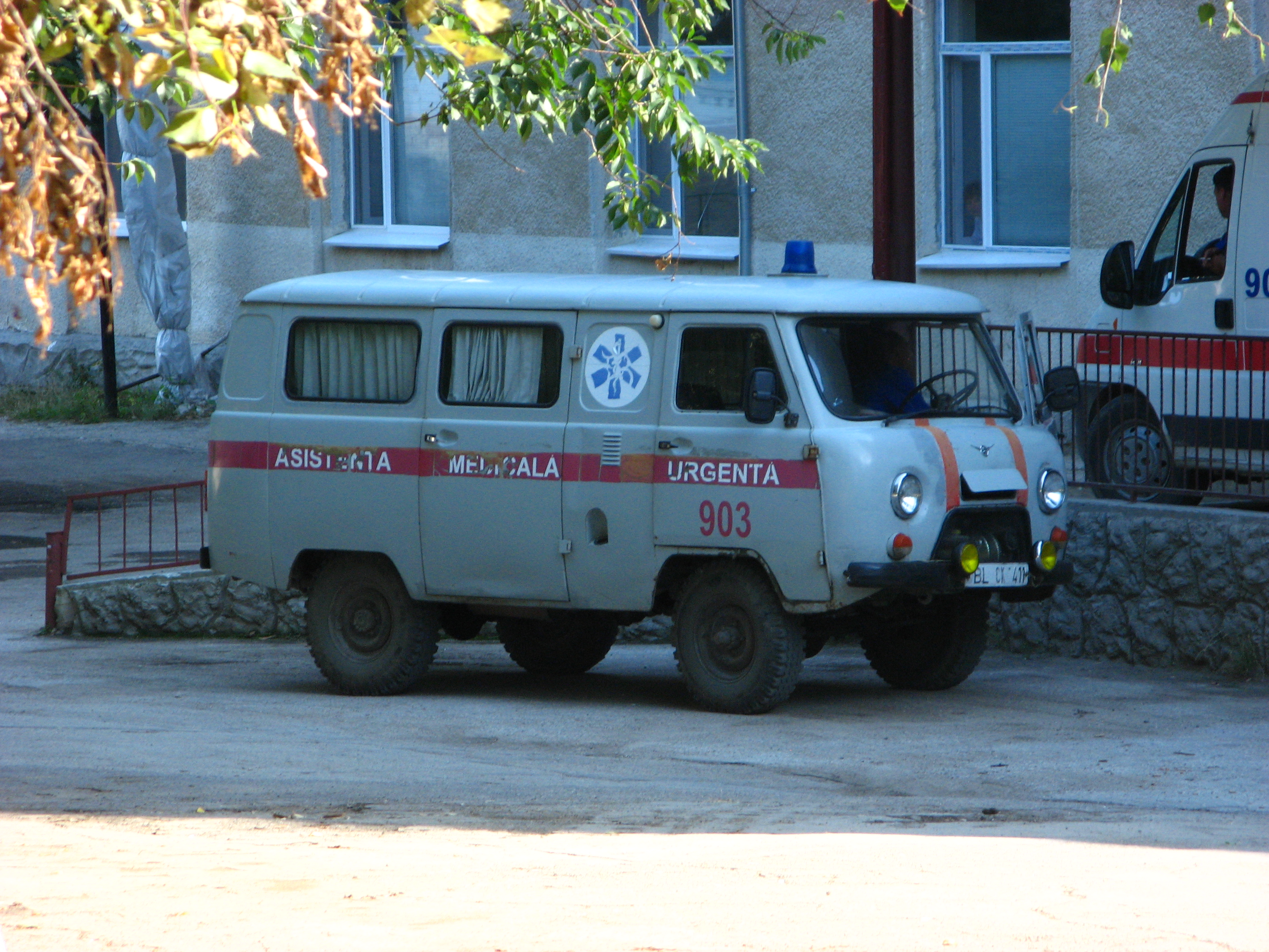 Ambulanţă în curtea spitalului raional Rîşcani.